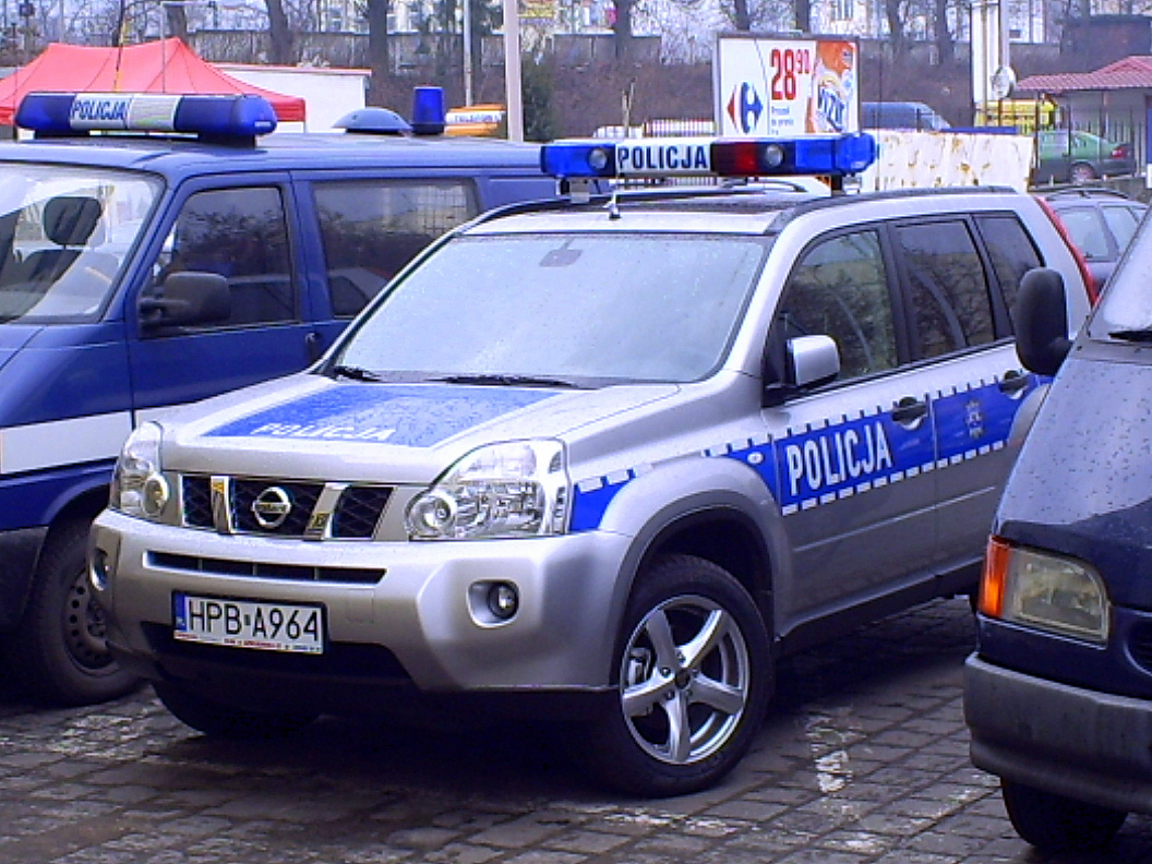 Samochód Polskiej Policji marki: Nissan Nissan X-Trail z nowym malowaniem zgodnym z dyrektywą Unii Europejskiej.